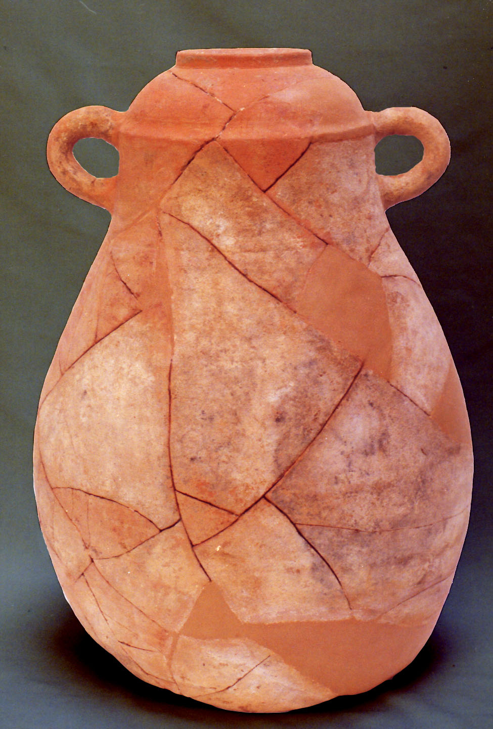 Ánfora fenicia, tipo R.1 de Vuillemot, sin base, labio vertical con engrosamiento interior, hombro hemisférico de carena muy marcada, galbo globular, la base no se conserva, posiblemente pintada con bandas. Dos asitas de sección circular están ajustadas a la panza desde la carena. Superficie anaranjada sin tratamiento conservado, pasta anaranjada con desgrasante esquistoso y calizo. Diám. borde: 13 cm, diám. max: 48cm, alt. cons.: 63 cm. Este tipo de ánfora constituye la forma dominante en la colección de hallazgos. El borde engrosado con ese labio resaltado hacia el interior de la boca recuerda las producciones del alfar fenicio del Cerro del Villar (Málaga) fechado en el primer cuarto del s. VI a.C. (580-560 a.C). Es de destacar que en esta colección de materiales escasean los perfiles con labios verticales delgados típicos de las ánforas R1 de Trayamar habituales del pleno siglo VII a.C. Existen, pero de forma testimonial, debido, quizás, a la cronología más tardía del contexto de l'Alt de Benimaquia.